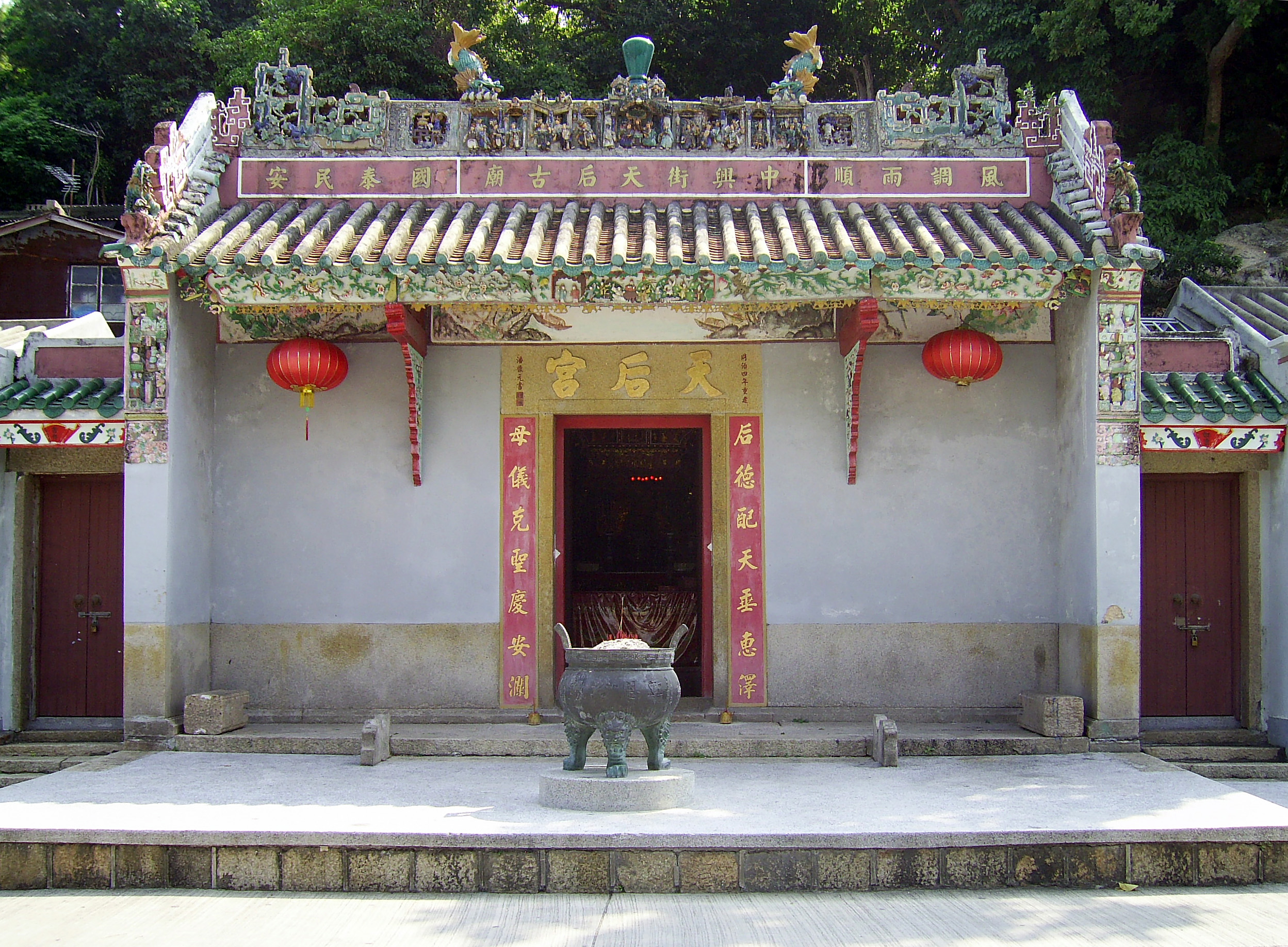 中文（香港）: 長洲大石口天后宮